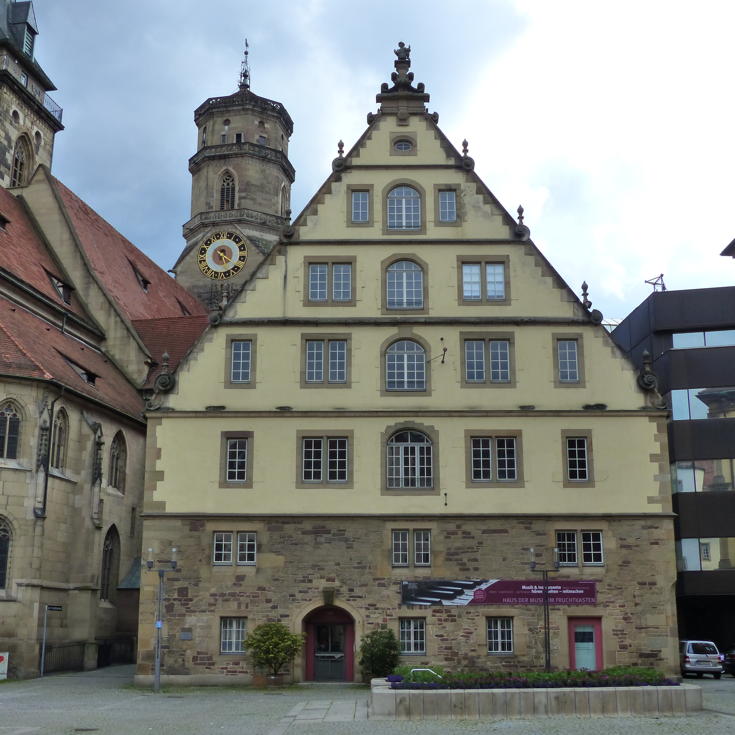 Fruchtkasten am Schillerplatz in Stuttgart, Musikinstrumente-Sammlung, Teil des Landesmuseums Württemberg